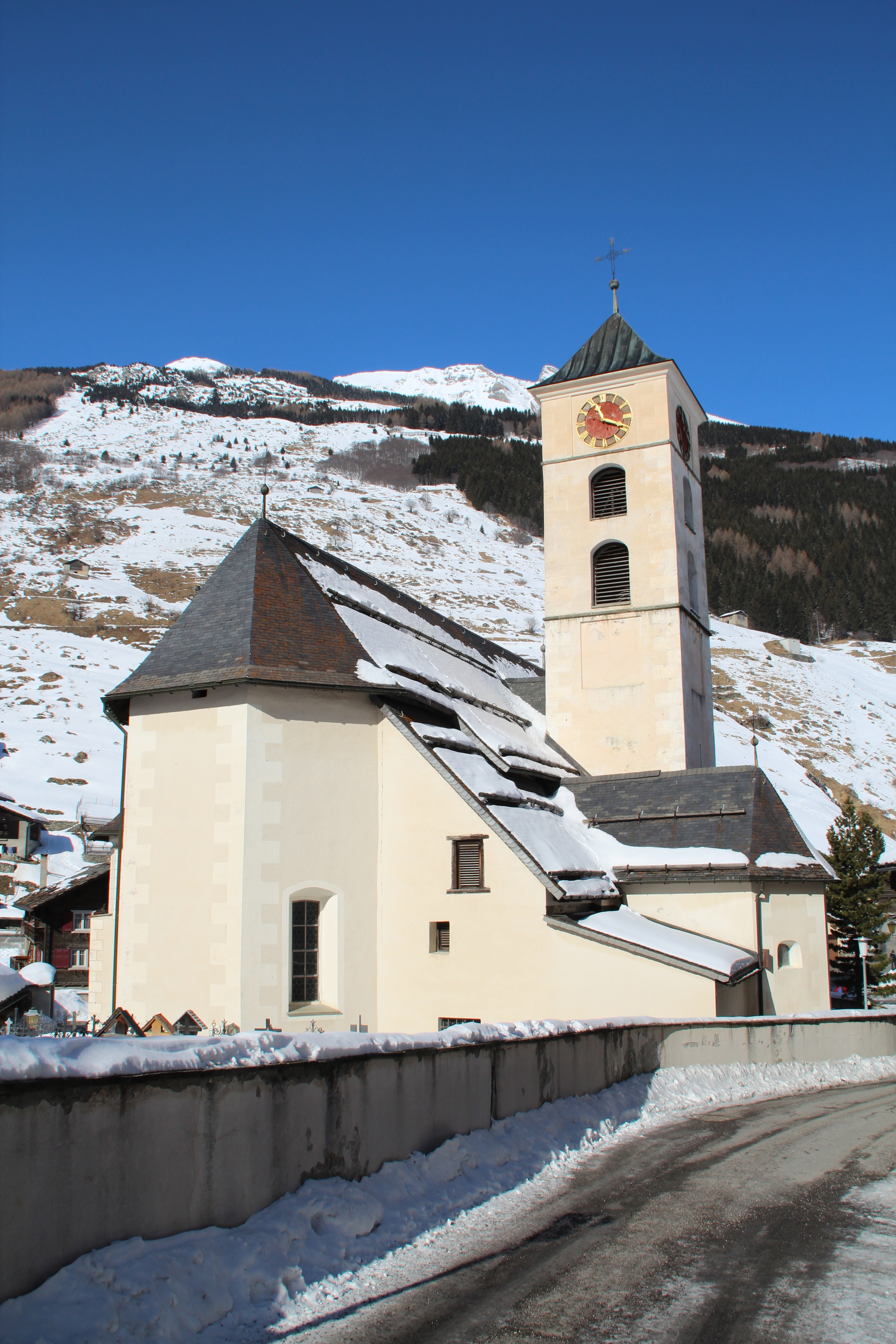 Kirche St. Peter und Paul (Vals) Von Süden